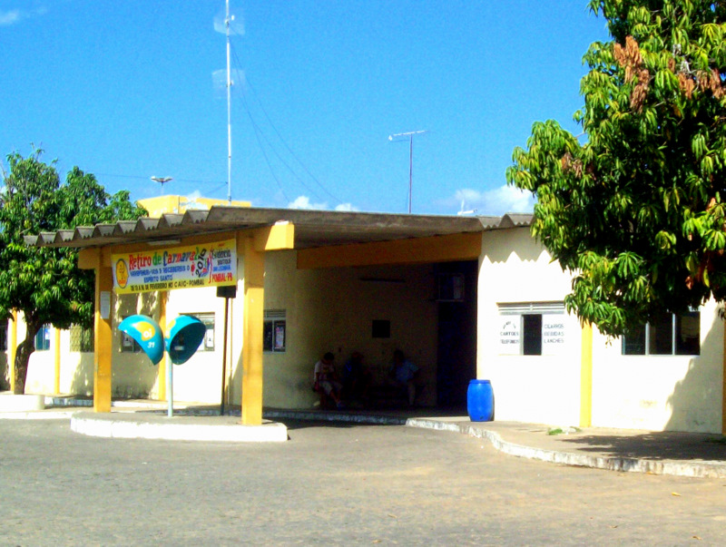 Entrada do terminal rodoviário de pombal.